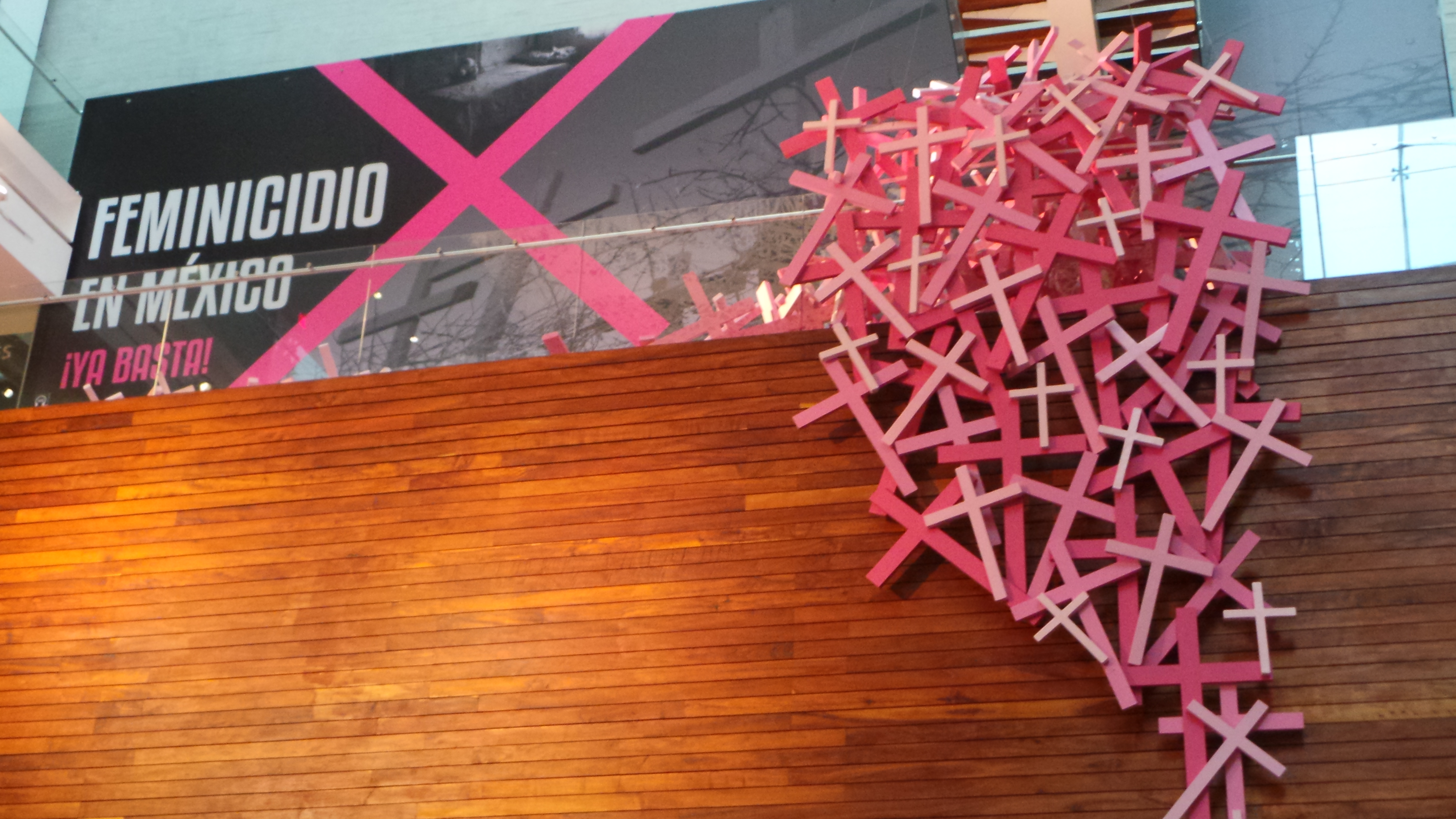 Obra de bienvenida de la exposición "Feminicidio en México ¡Ya basta!" Museo Memoria y Tolerancia. Ciudad de México